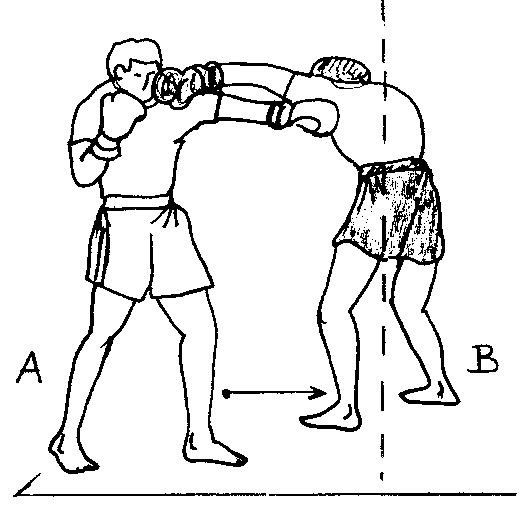 drop5.jpg